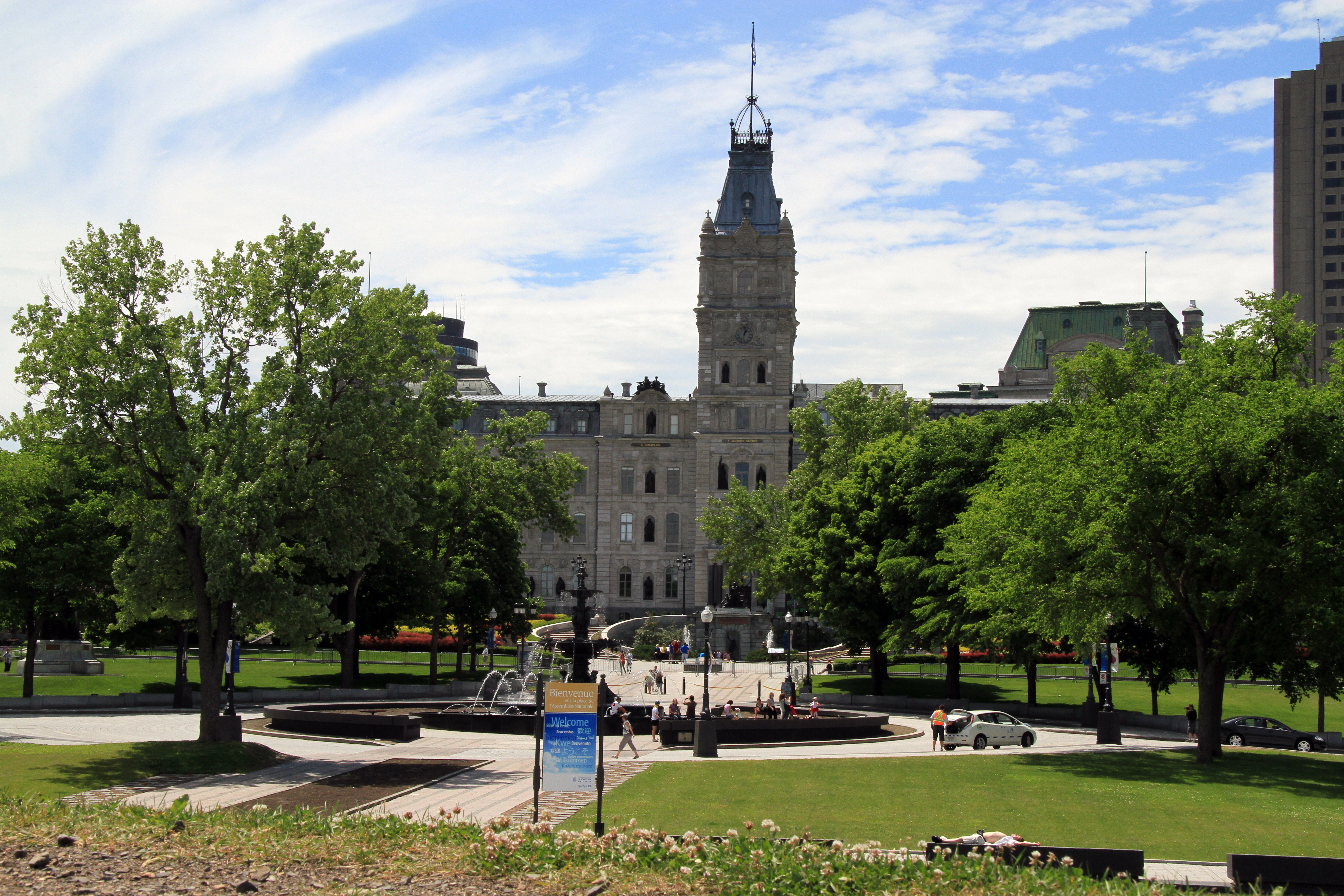 L'Hôtel du Parlement de Québec et la fontaine de Tourny, vus des remparts.